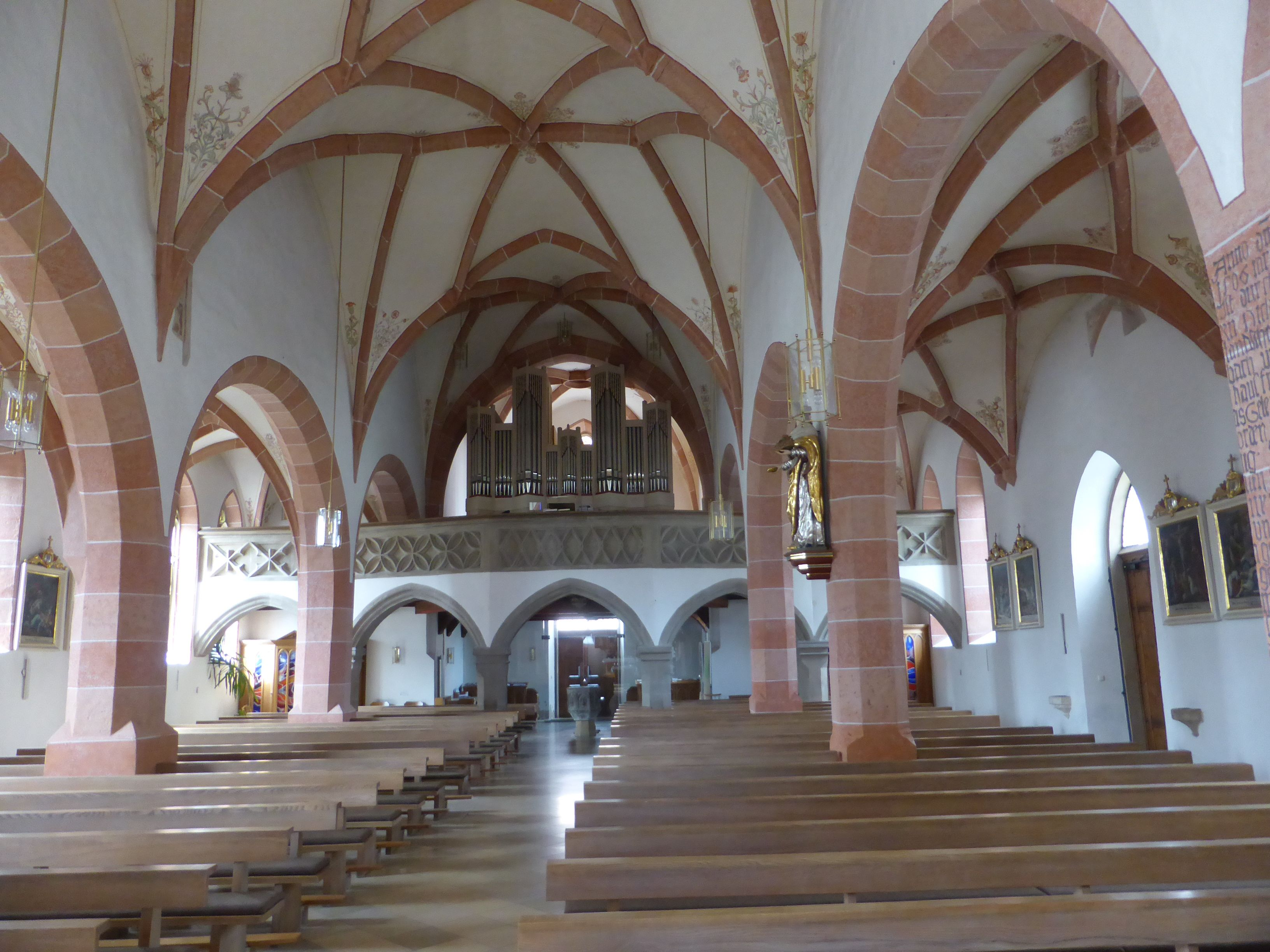 Orgelempore von St. Laurentius (Eschenbach in der Oberpfalz)